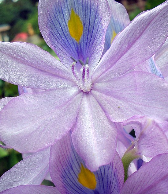 Eichhornia crassipes